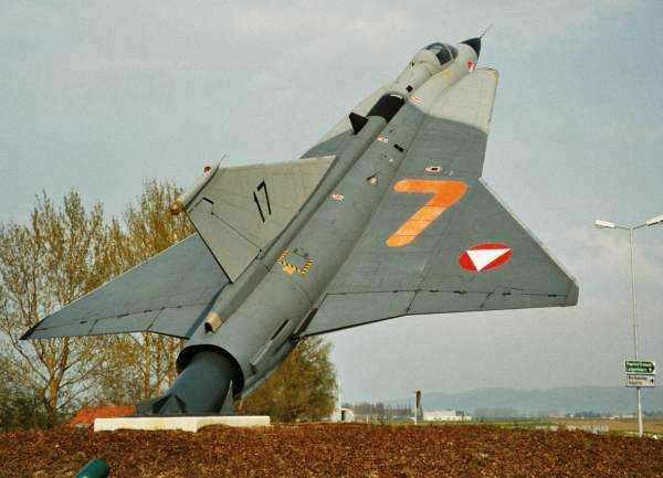 Saab J35 Draken (S/N 35368) in Tulln an der Donau